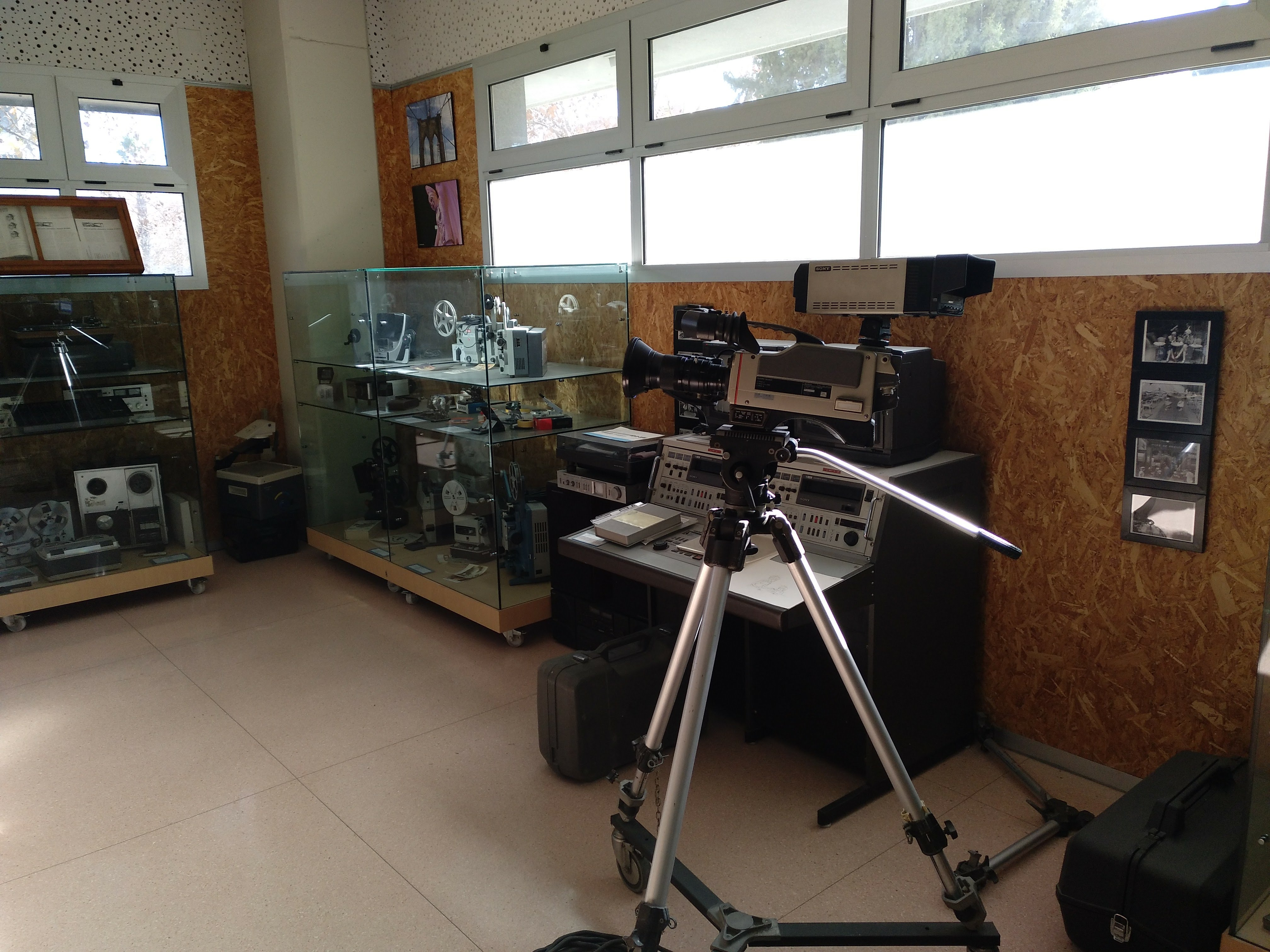 Una vista del área de imagen en el Museo Alfonso X el Sabio (MusaX) de Murcia